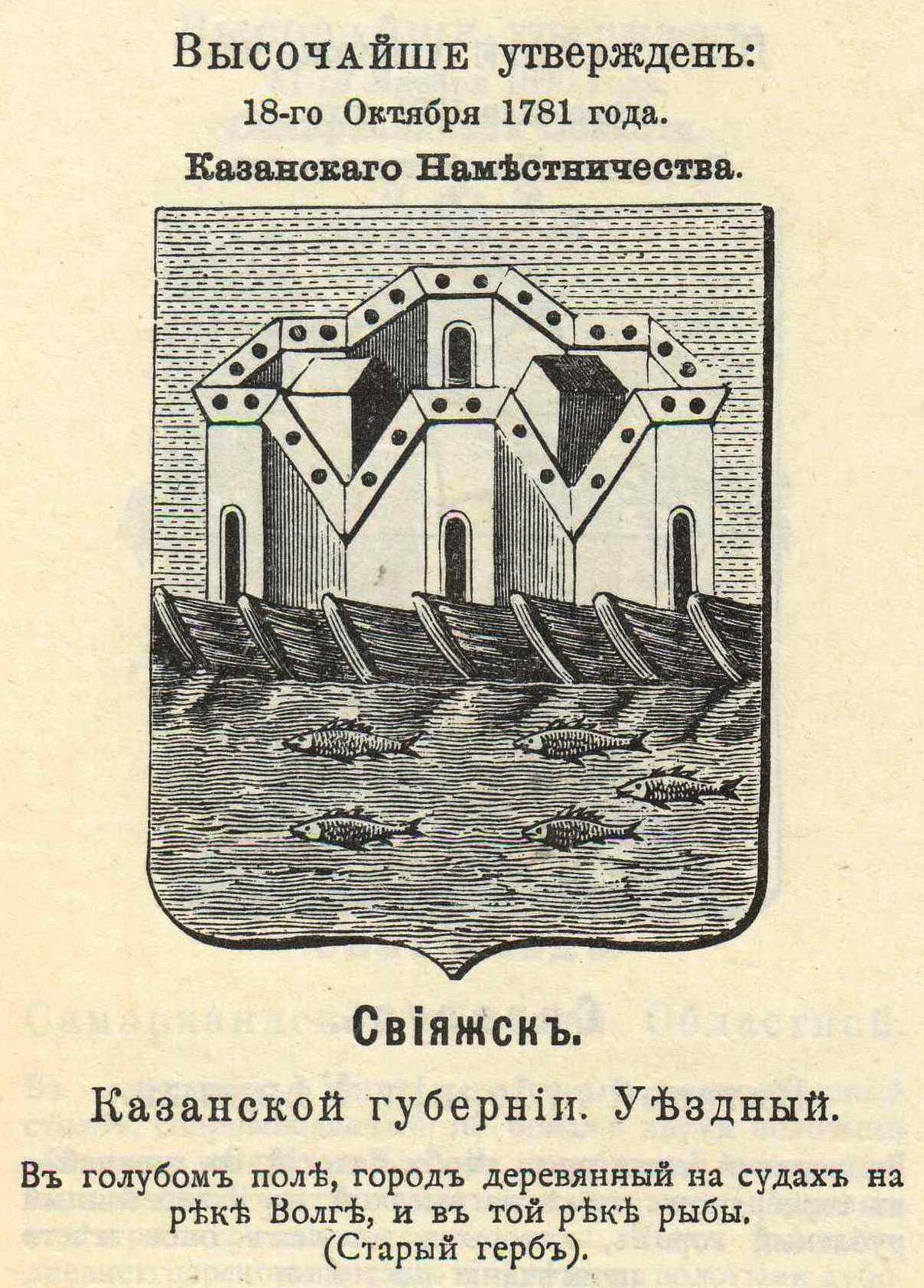 Official Russian Empire coat of arm. Герб Российской Империи уездного города Свияжск Казанской губернии с официальным описанием в Гербовнике Винклера.